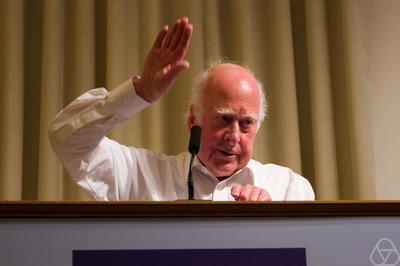 Peter Higgs (* 1929)